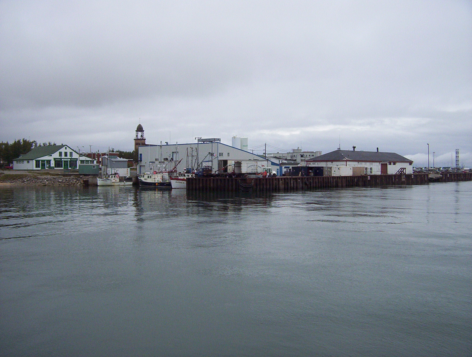 Havre-St-Pierre Auteur : Stéphane Voyer